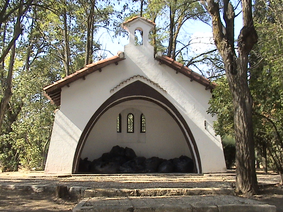 Antigua capilla del Aeródromo de Barberán y Collar de Alcalá de Henares (Comunidad de Madrid - España) construida en 1943. Actualmente campus exterior de la Universidad de Alcalá.